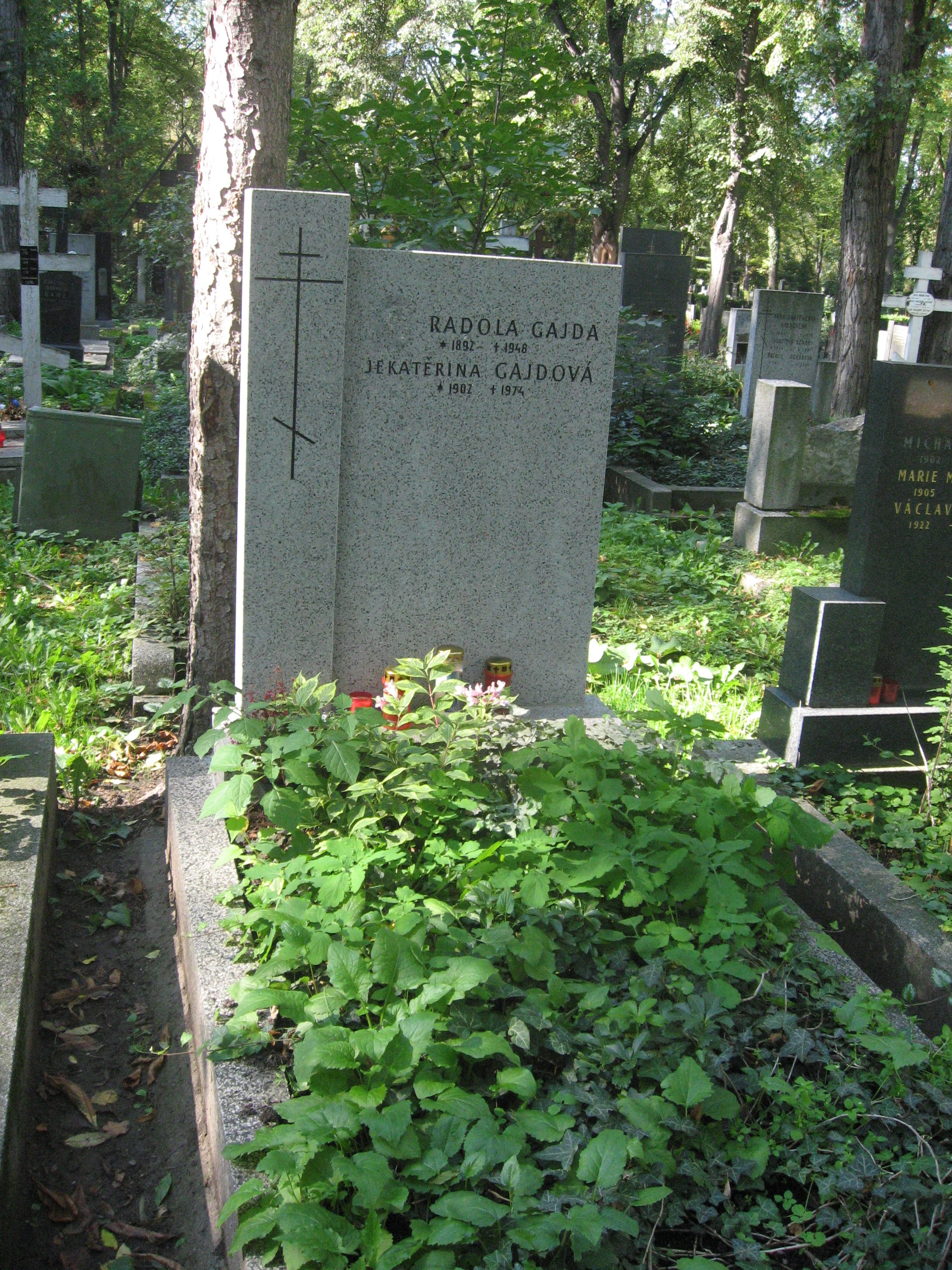 Olšanské hřbitovy, Radola Gajda